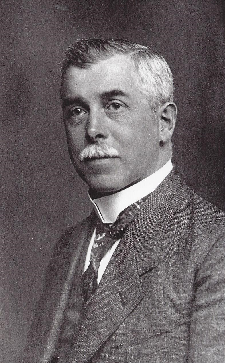 Porträtfotografie des Schweriner Juweliers Richard Ratfisch